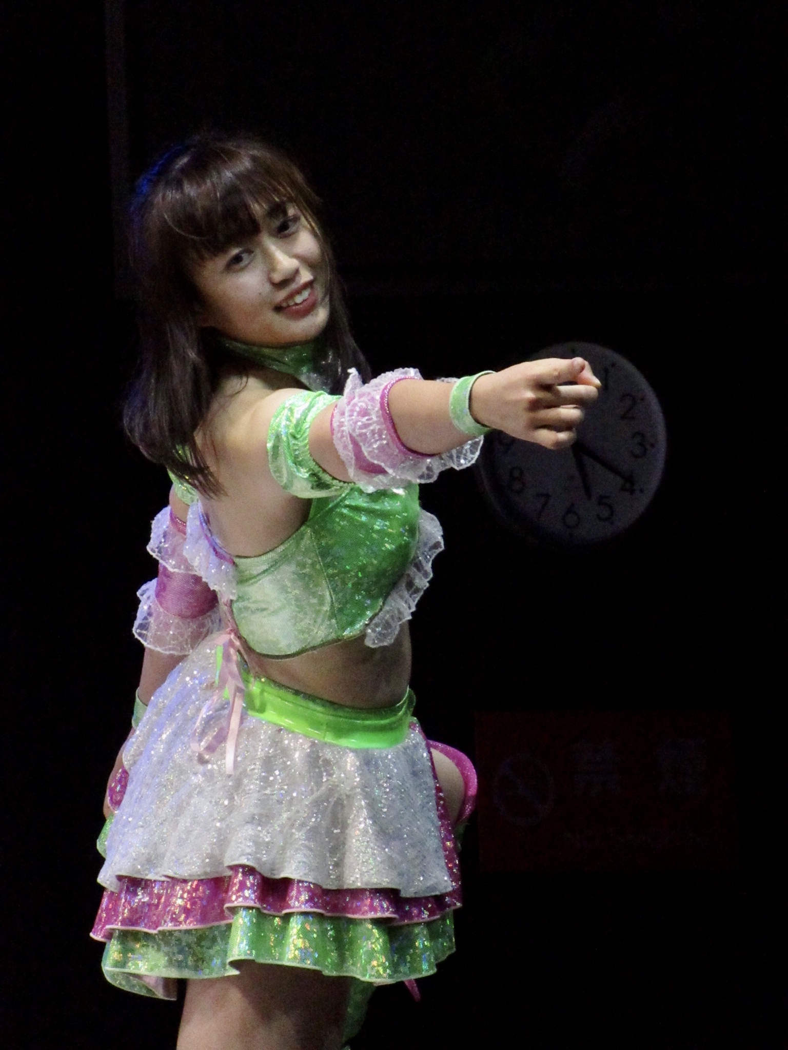 スターダム2019年10月19日大阪大会